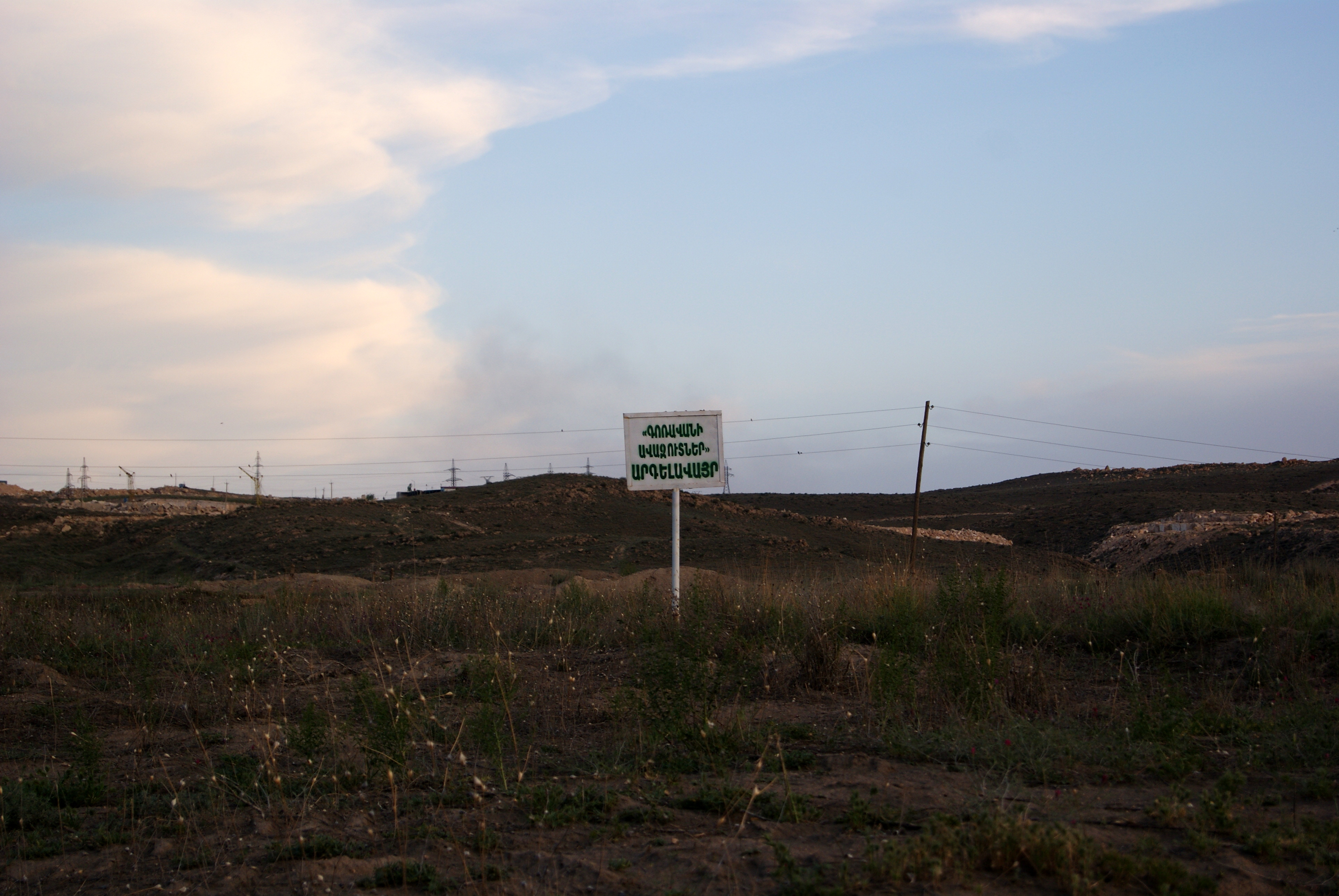 Գոռավանի ավազուտներ արգելավայր